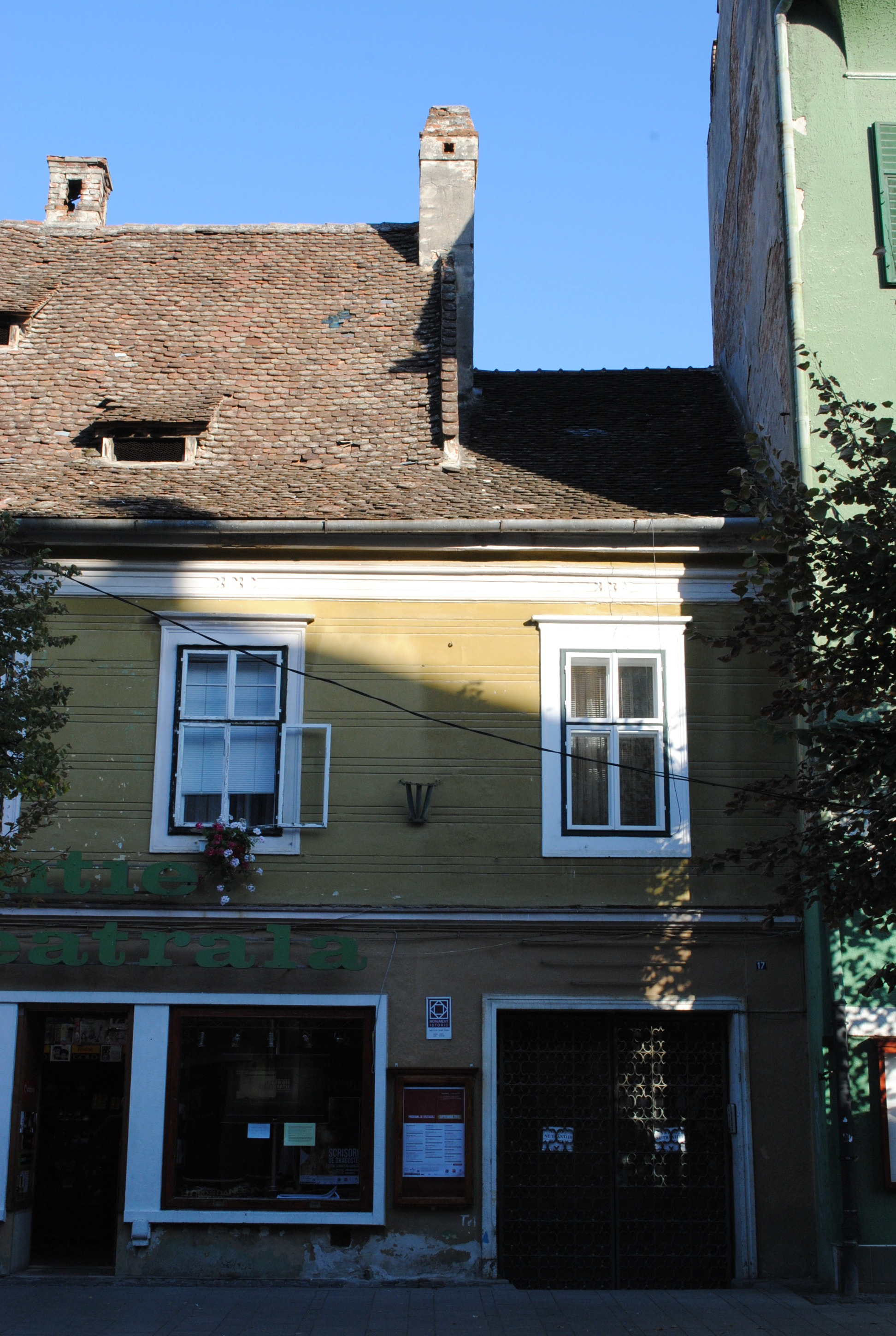 Casă, sec. XVI - XVII (fragmente), sec. XVIII